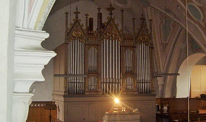 Orgelprospekt